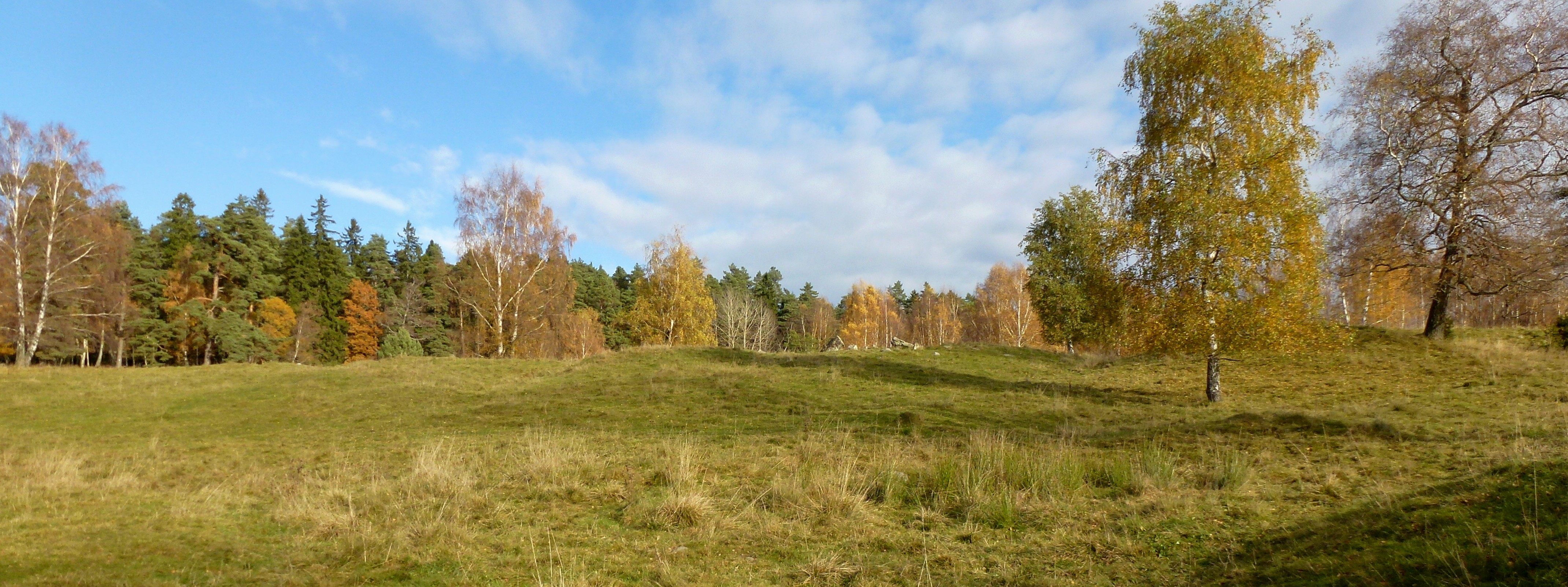 Söderby fornområde